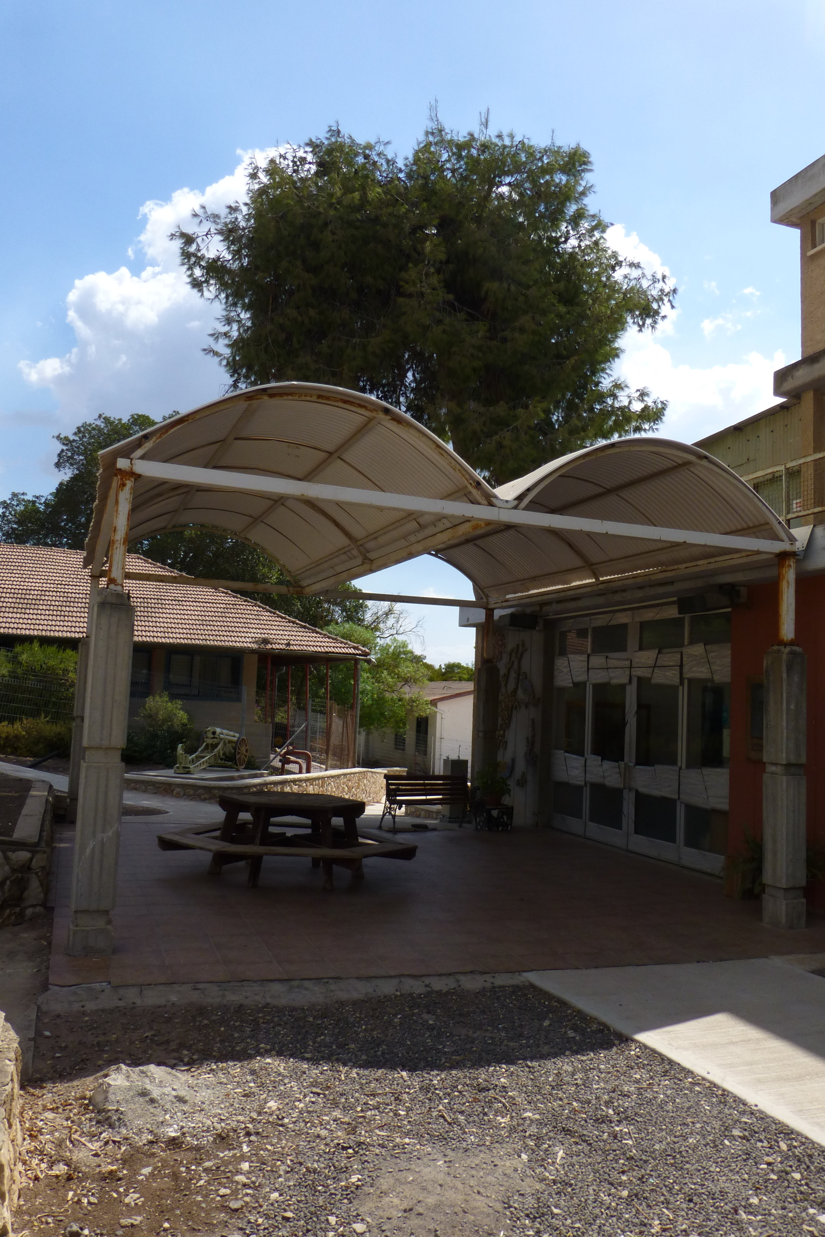 מוזיאון בית שטורמן המצוי בקיבוץ עין חרוד מאוחד נוסד בשנת 1941 על ידי חבר הקיבוץ שמואל סבוראי כמוזיאון לטבע.